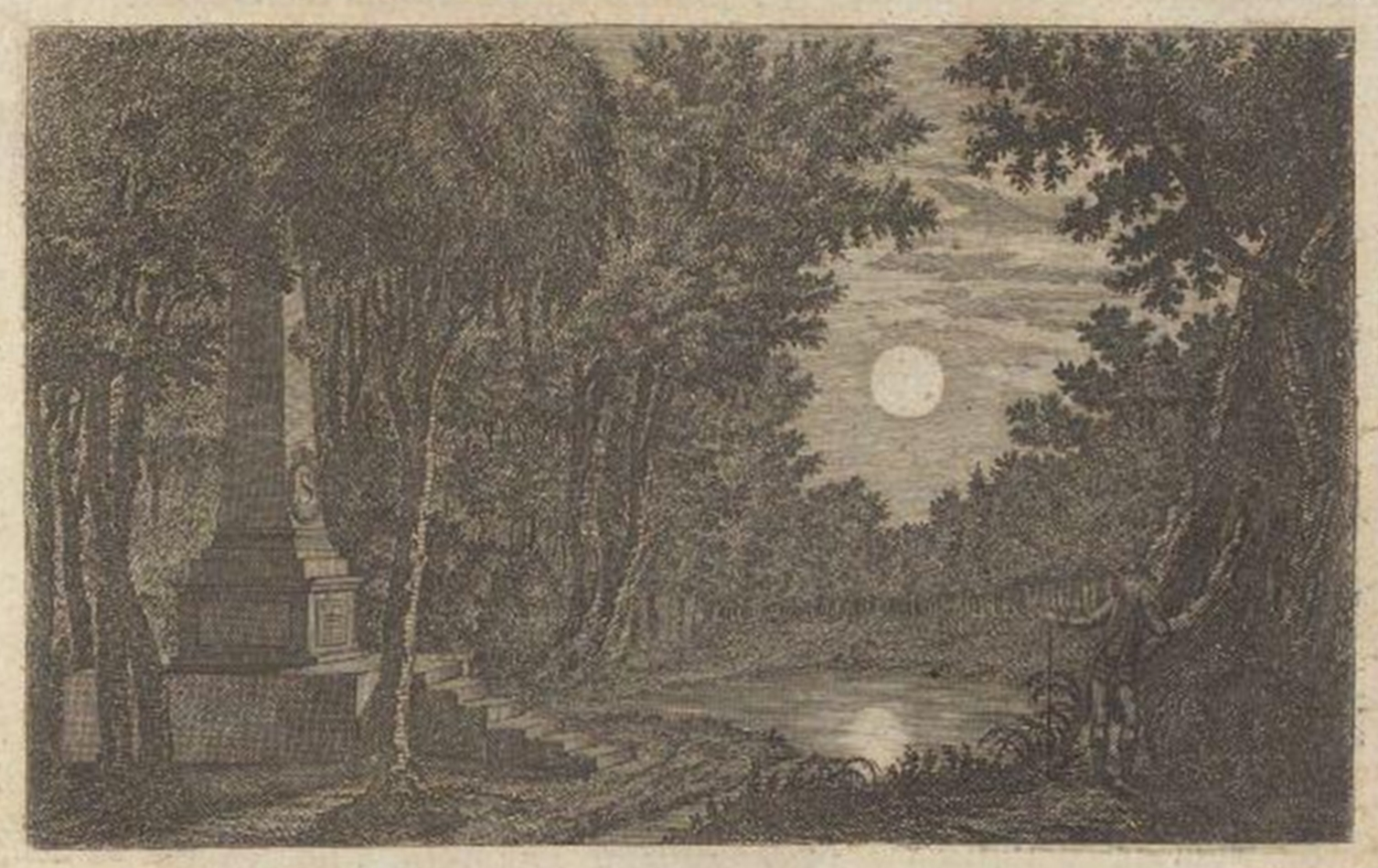 Eine Gegend mit dem Grab Johann Georg Sulzers bei Mondschein / Kupferstich nach einer Zeichnung von J. H. Brandt / Illustration aus Band 2 von C. C. L. Hirschfeld „Theorie der Gartenkunst“, Leipzig